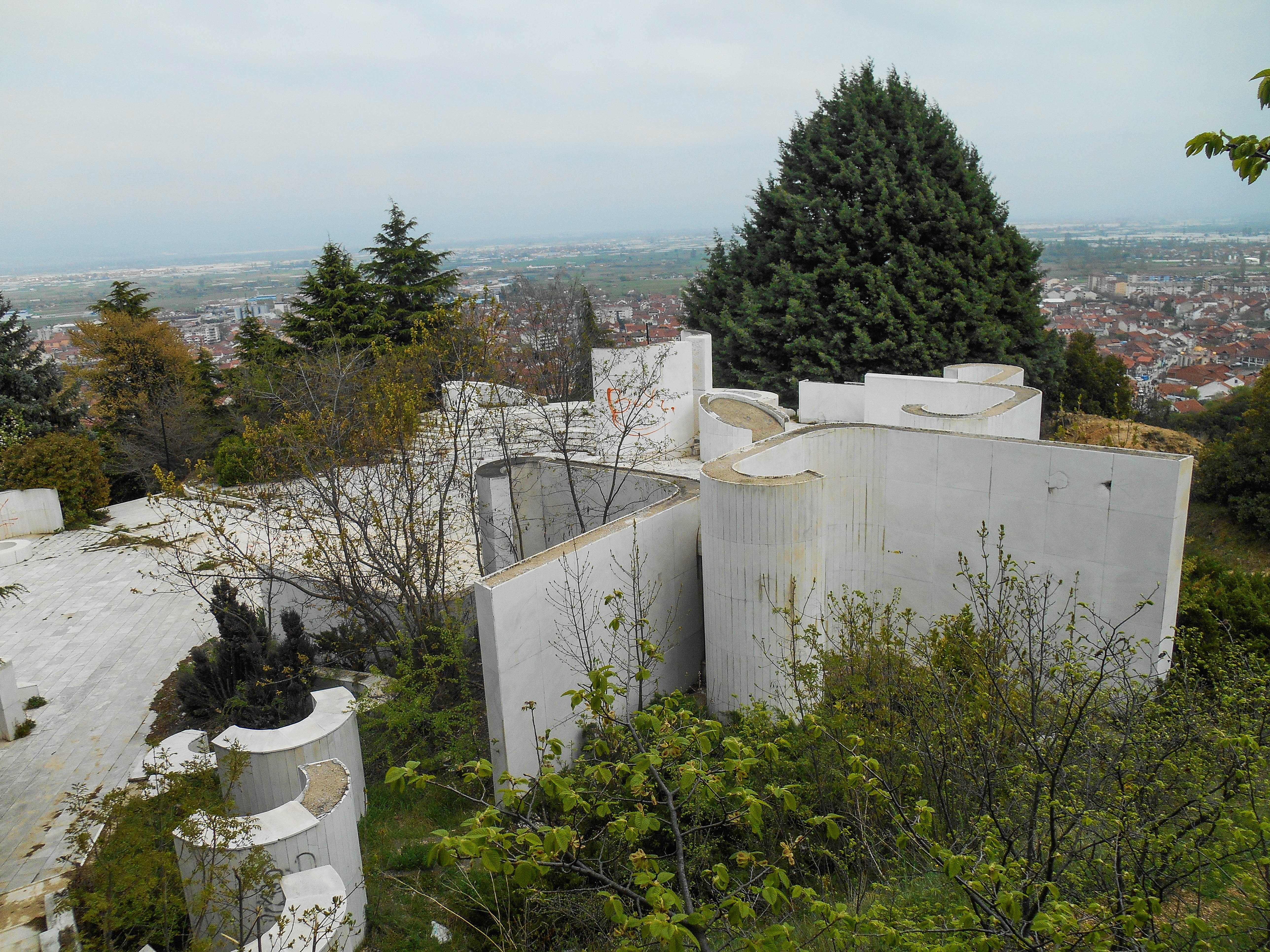 Споменик Костурница